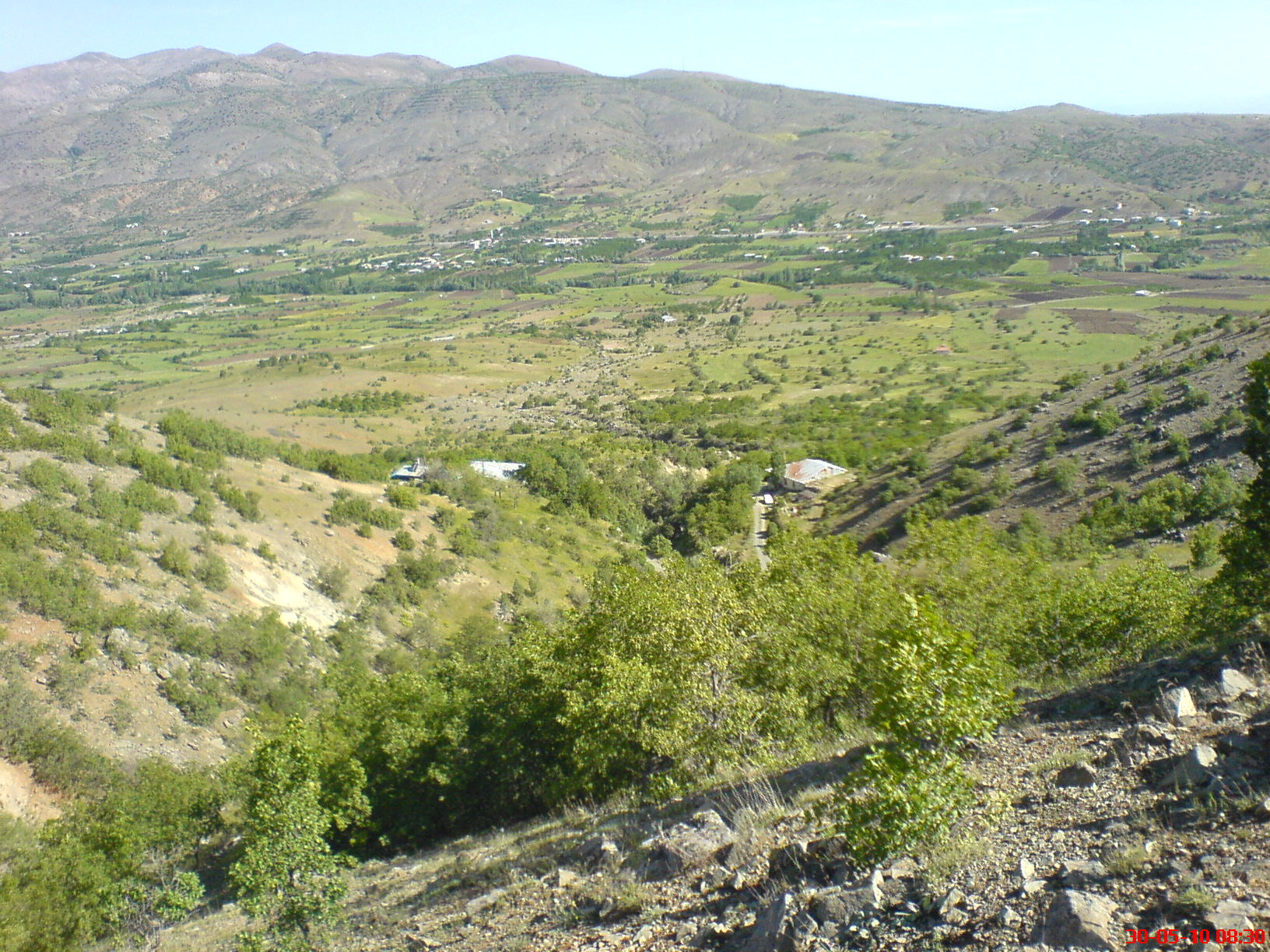 pincirik